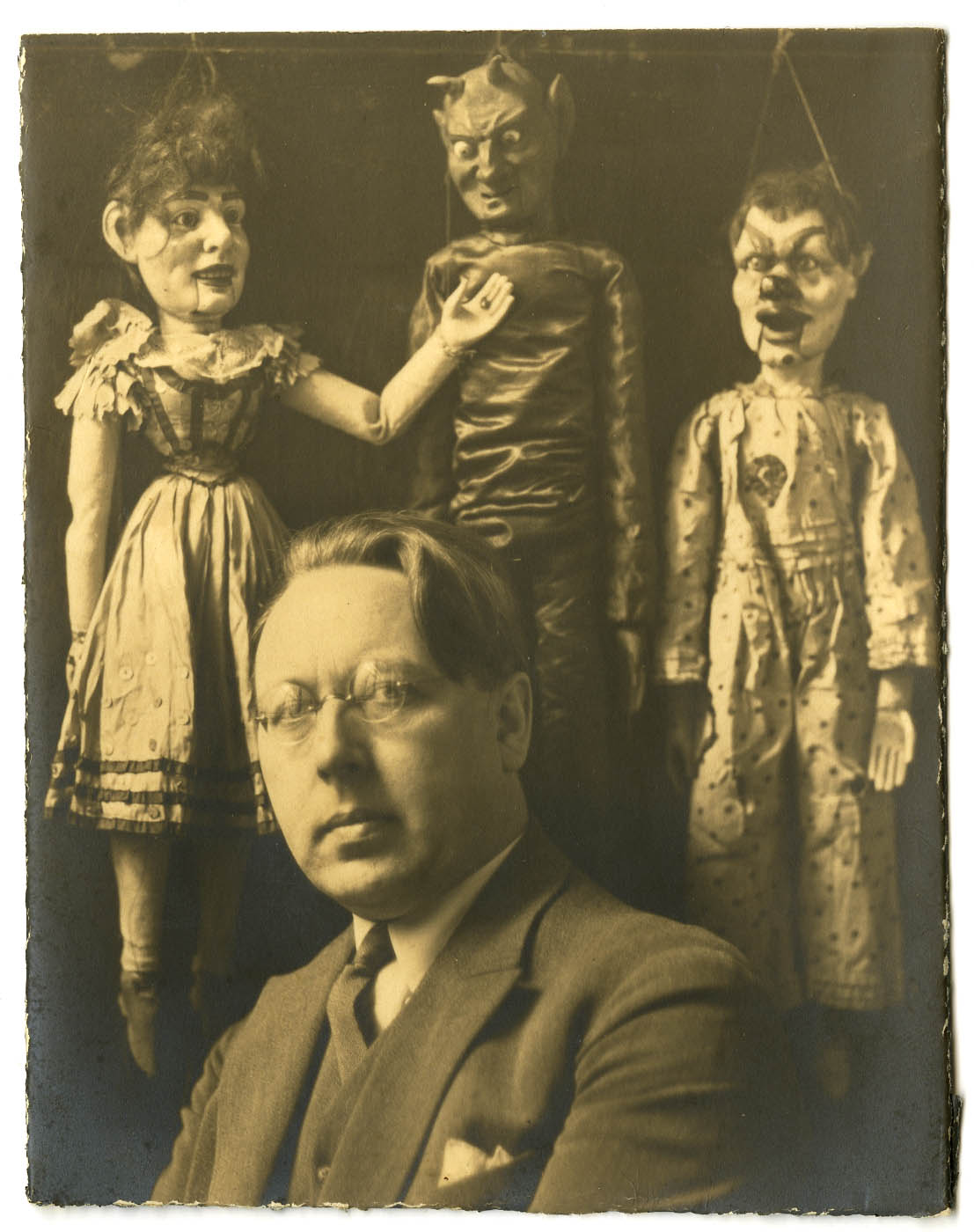 Carl Niessen (in den 1920er Jahren); Quelle TWS